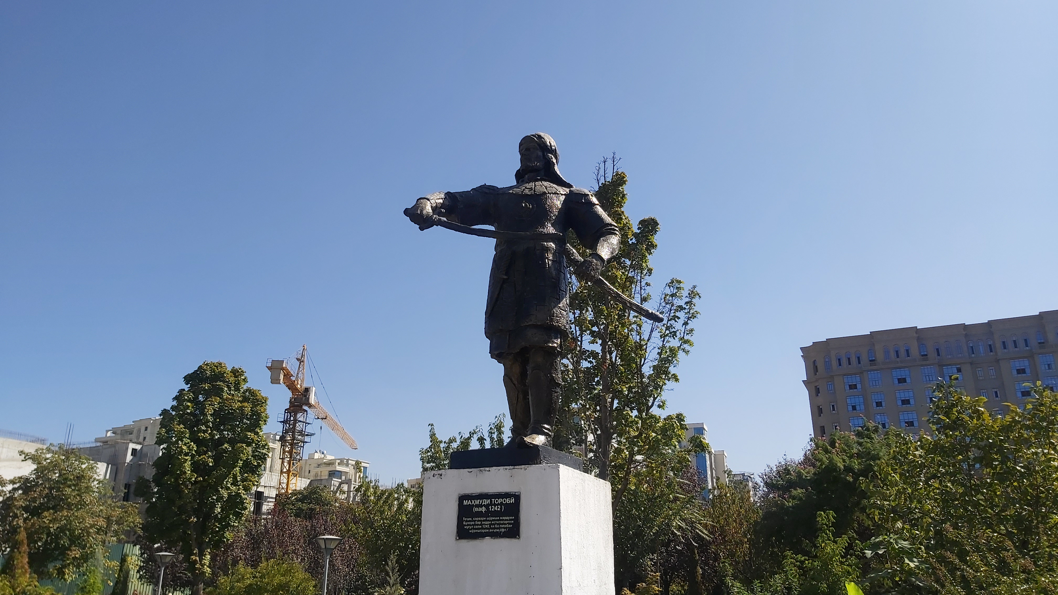 Махмуд Тараби